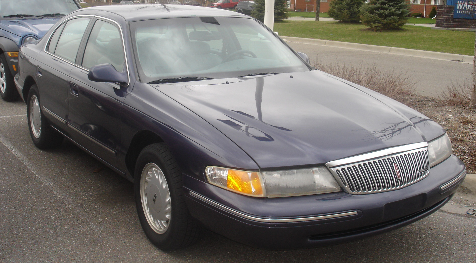 1995 Lincoln Continenetal